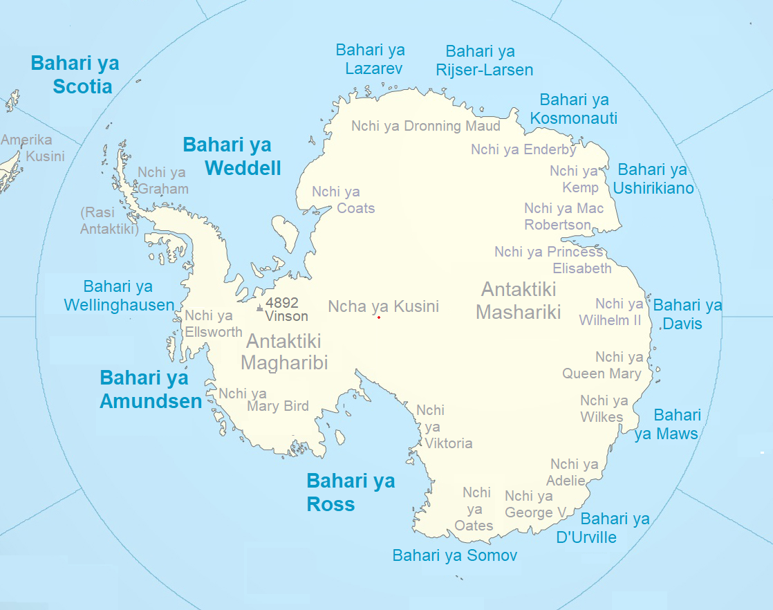 Kiswahili: Bahari zinazopakana na Antaktiki, majina yameswahilishwa